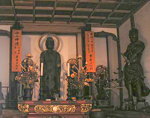 辻の薬師本尊・十二神将